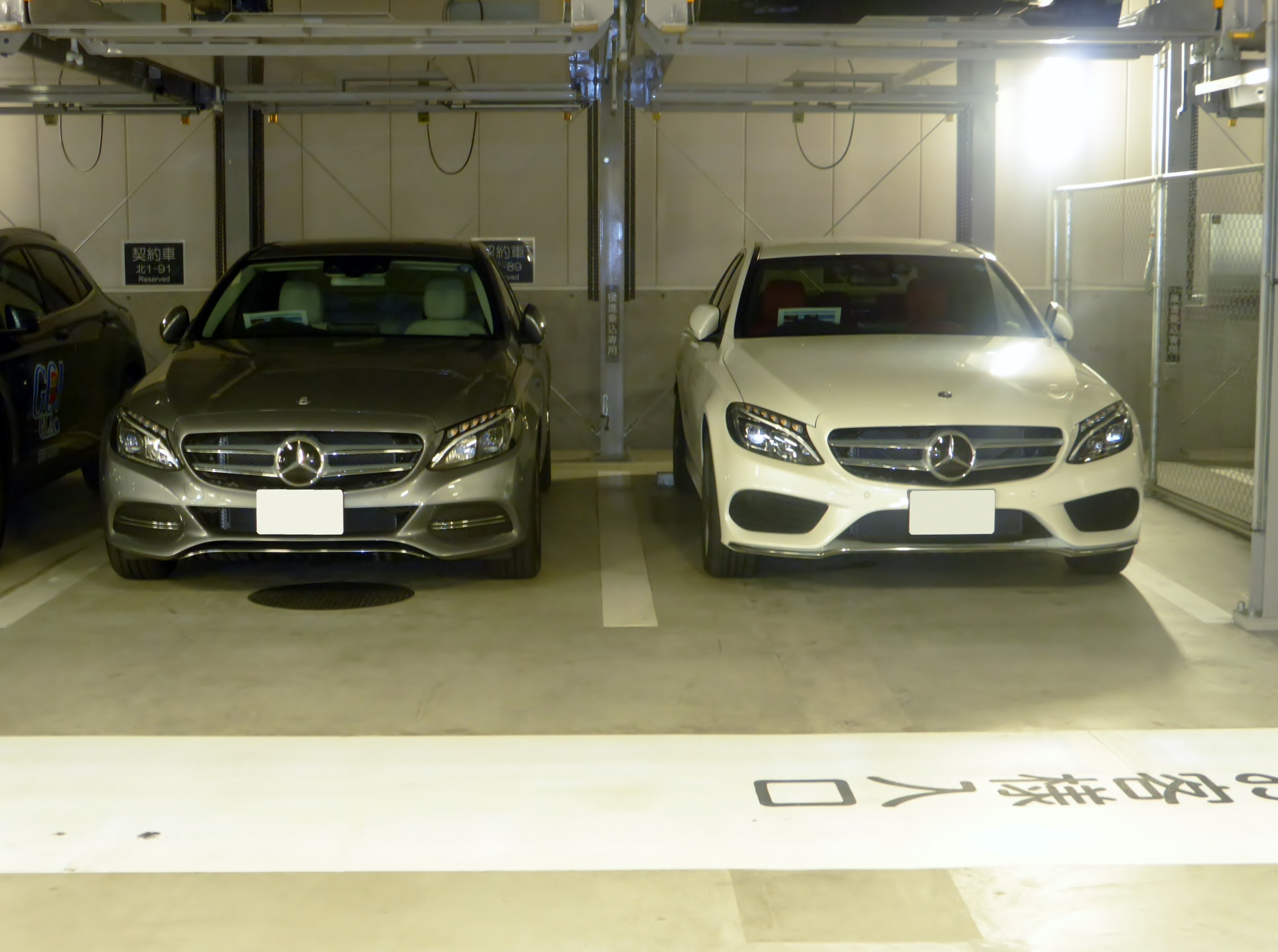 W205型メルセデス・ベンツC180アヴァンギャルドとC200アヴァンギャルドをそれぞれフロントから撮影。